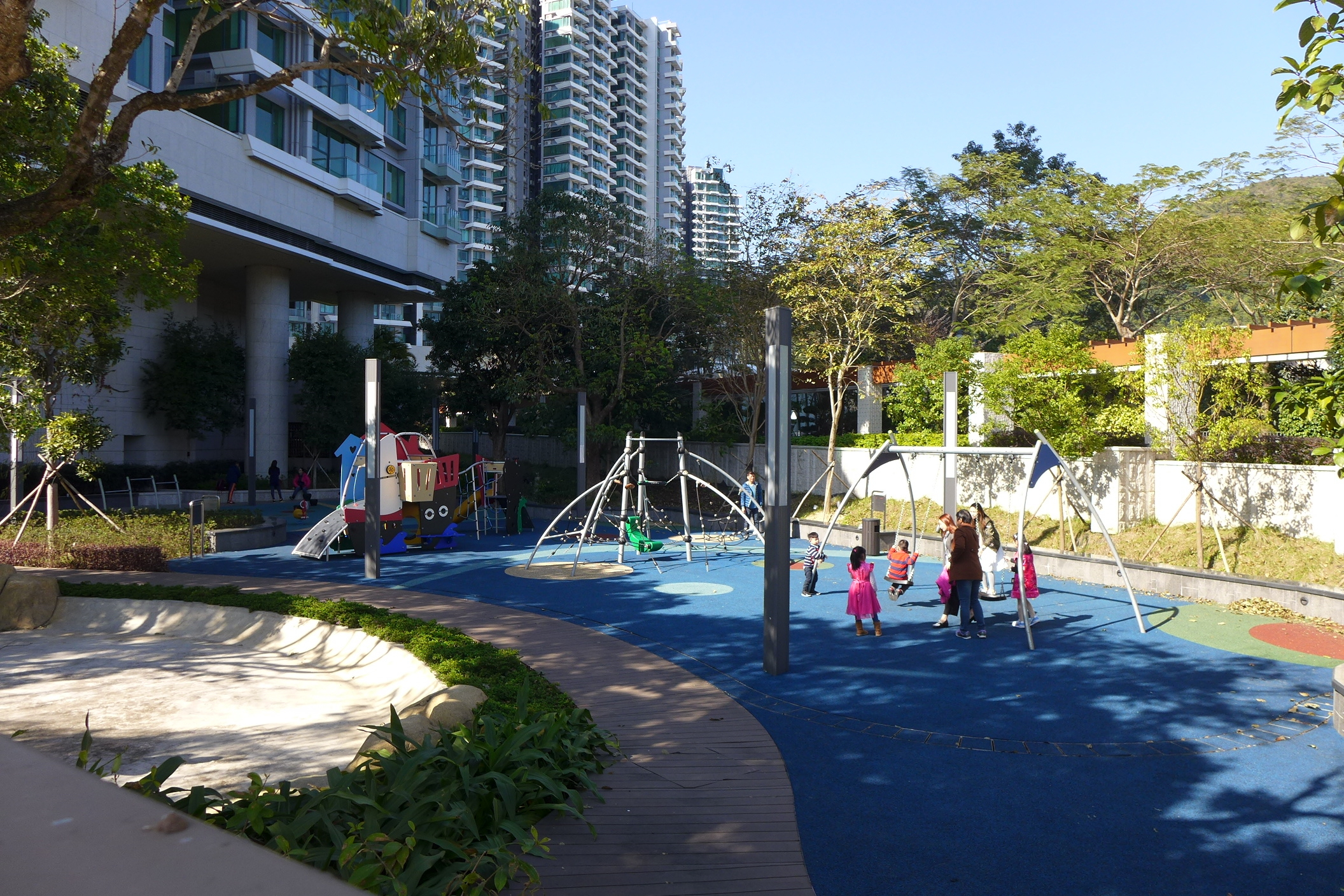 Mont Vert Children Play Area